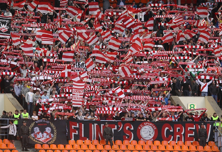 Бригадный баннер легендарной фанатской группировки "Flint’s Crew" на матче с ЦСКА. 2011 год